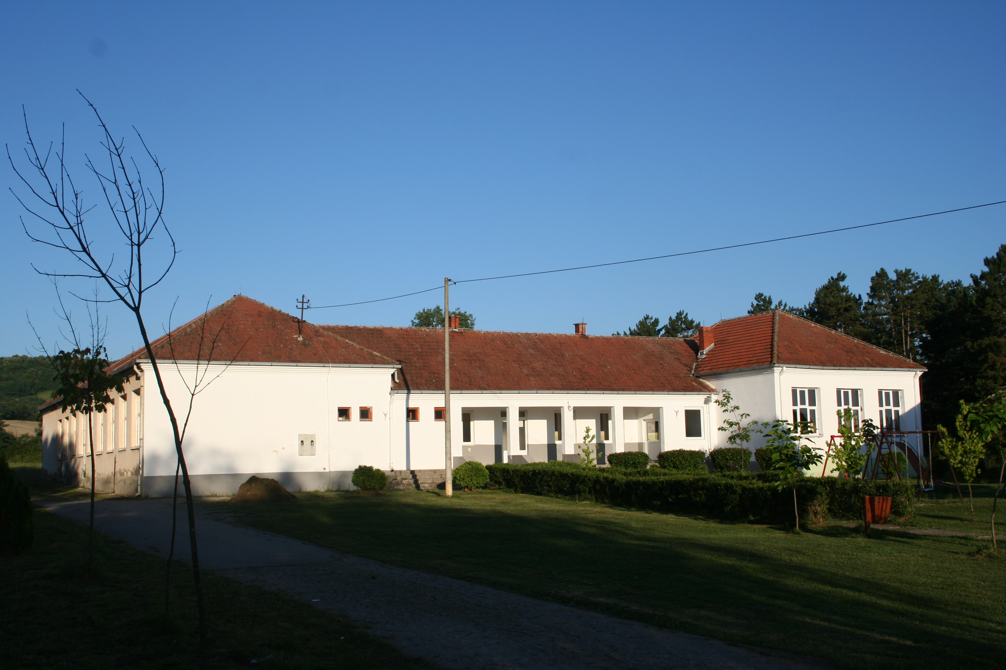 Bajevac, Škola i spomenik